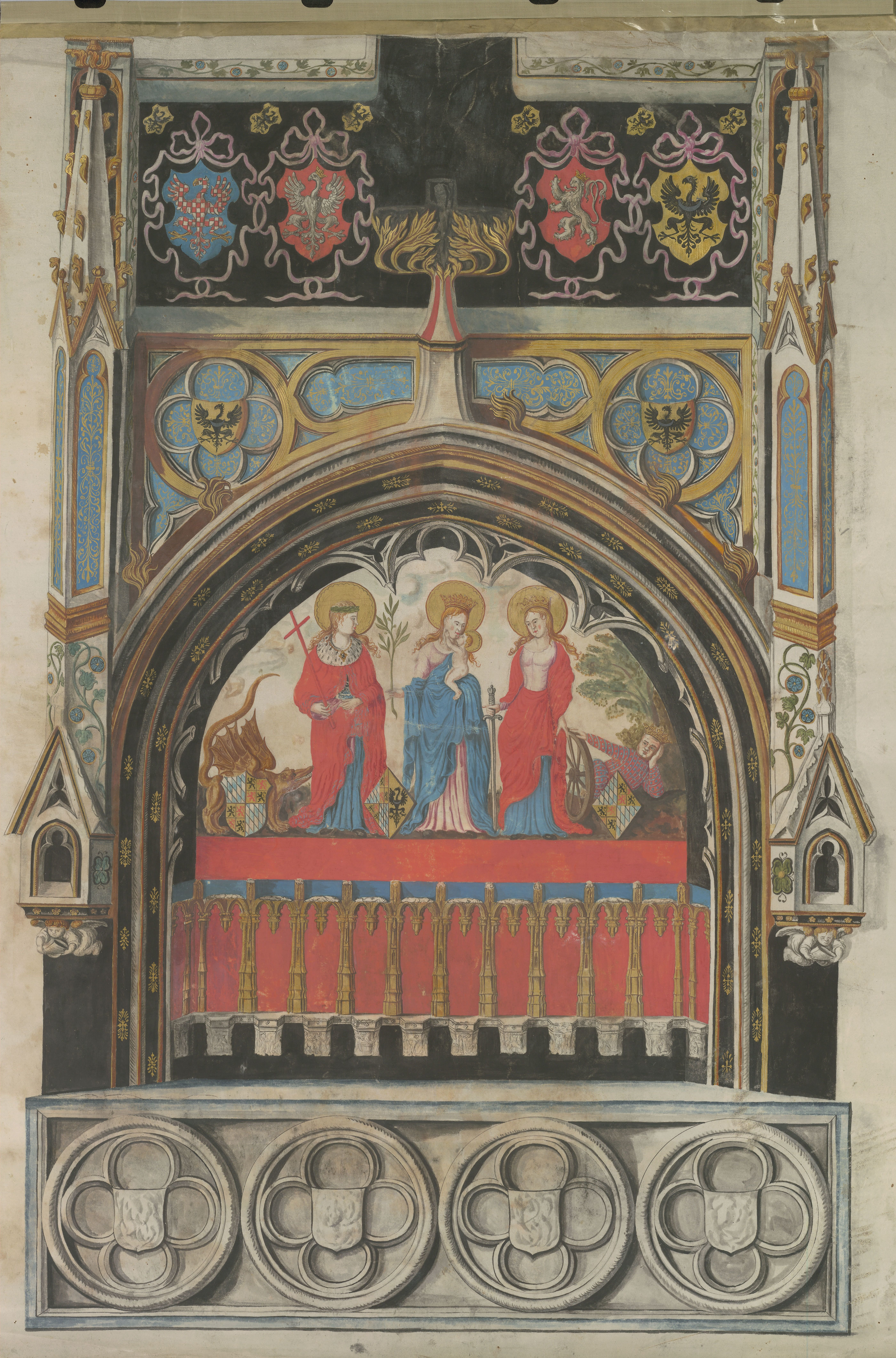 Aftekening van de graftombe van Margaretha van Brieg (1342-1386) in Hofkapel te Den Haag. Nadien werden voor de tombe ook Margaretha's echtgenoot Albrecht van Beieren (1336-1404) en hun beider kleindochter Jacoba van Beieren (1401-1436) bijgezet. Bovenaan de tombe, v.l.n.r., de wapens van Moravië, Polen, Bohemen en Silezië, het laatste tevens het familiewapen van Margaretha van Brieg. Over de figuratieve schildering van Maria met kind tussen de HH. Margaretha en Catharina, de wapens van, v.l.n.r., Albrecht van Beieren, Margaretha van Brieg en Jacoba van Beieren. De tombe werd ontworpen door Jan Keldermans I (overl. ca. 1425), de beschildering werd vervaardigd door Jacob van Munnicken (Jacob van München?). Formaat 72 x 50 cm Techniek Tekening in kleur op perkament Extra informatie Eerdere beschrijving in de catalogus, oud inventarisnummer 7370, door J.C. Overvoorde (1907) is na onderzoek van Bernard Vermet herzien. Literatuur: Bernard M. Vermet, 'Twee aftekeningen van grafmonumenten in de Hofkapel', in: Jaarboek Die Haghe 120 (2019), 12-27. Bernard M. Vermet, ‘Het Haagse grafmonument voor Margaretha van Brieg’, in: Matthijs Ilsink, Bram de Klerck, Annemarieke Willemsen (red.), Het einde van de middeleeuwen (Nijmegen, 2019), 274-279, 344. Tekening behorend tot een serie van 4 (inventarisnummers PV76369, PV76370, PV76371, PV76372), nagelaten aan het archief door Charles Dozy in 1901 en waarschijnlijk afkomstig uit het bezit van de rond 1580 gehuwde Gerrit van Poelgeest (1545-1614) en Anna van Glymes van Grimbergen (overl. 1611). Oude beschrijving: Rijk versierde altaaropstand van steen met beeldwerk en beschilderde boog met Maria en twee heilige vrouwen; hierboven lofwerk met den rijksadelaar en vier wapens. Maker onbekend, 2e helft 17e eeuw.